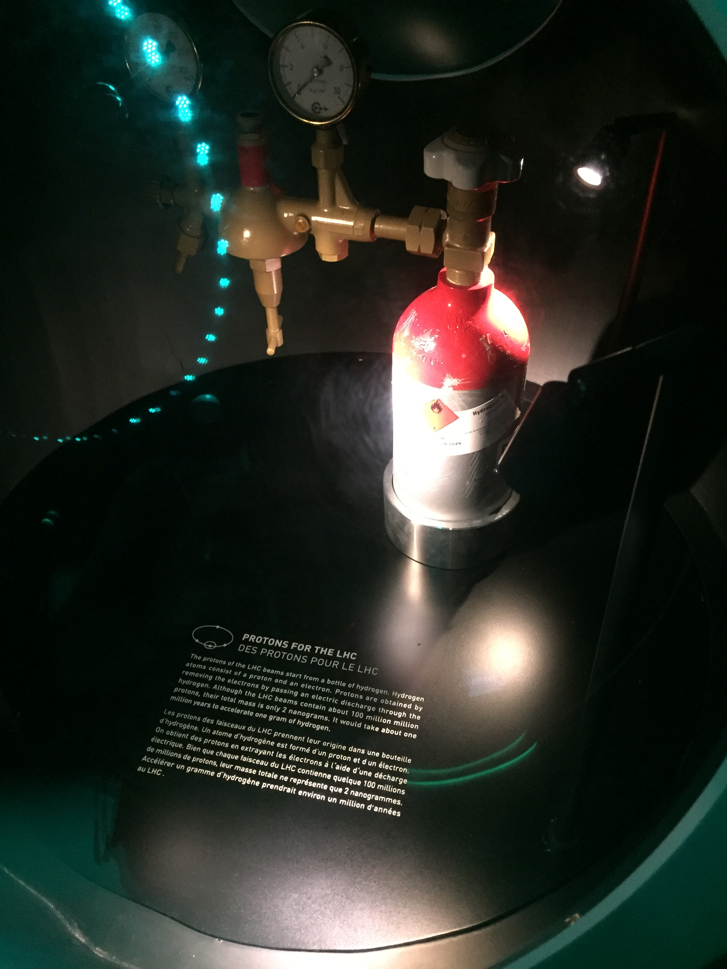 דגם של מיכל המימן בו מתחיל המסע של החלקיק לפני שהוא מואץ במאיץ החלקיקים LHC שבסרן